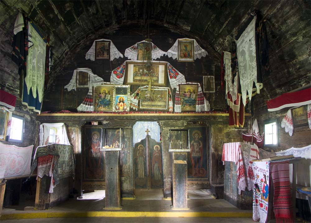 Biserica de lemn din Totoreni, interiorul navei (biserica bărbaţilor).